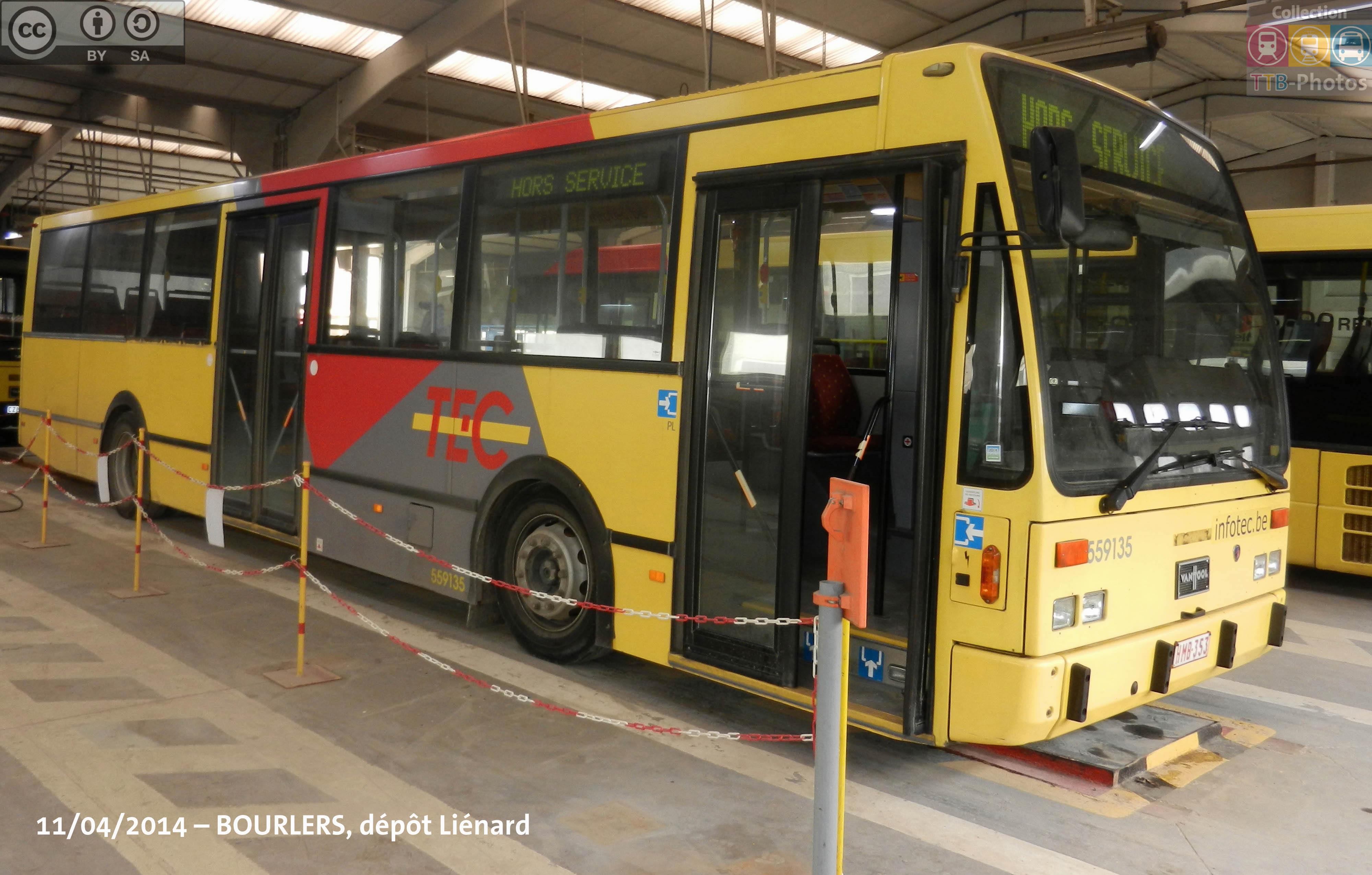 Ets G. Liénard & Cie - film HORS SERVICE Bourlers, dépôt - 11 avril 2014 Van Hool Linea Scania L94 UB4X2 (26/06/1995)